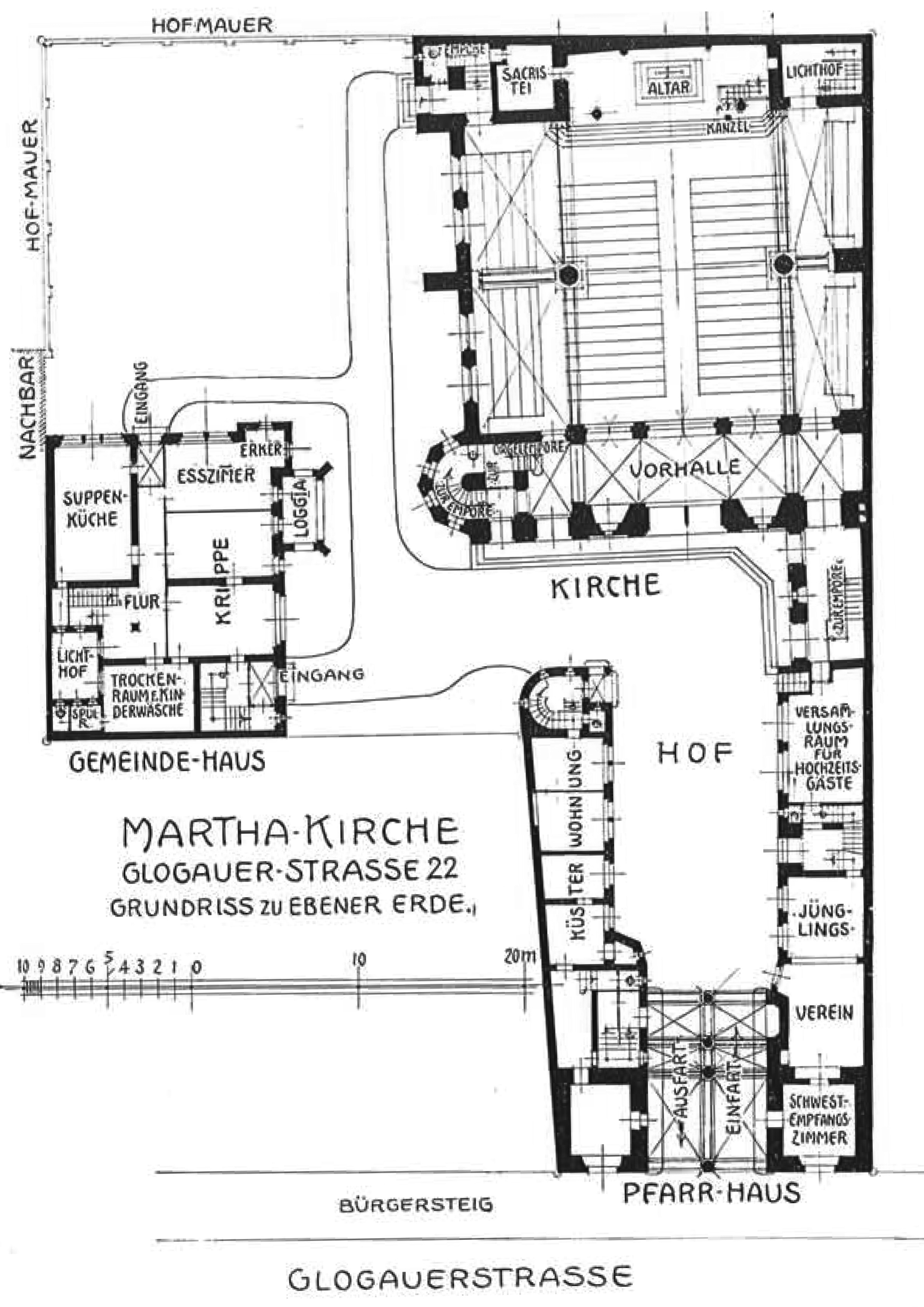 Grundriss des Gebäudeensembles der evangelischen Marthakirche in Berlin-Kreuzberg, Glogauer Straße 22